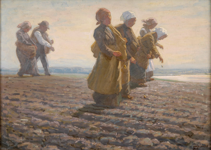 Die Säerinnen